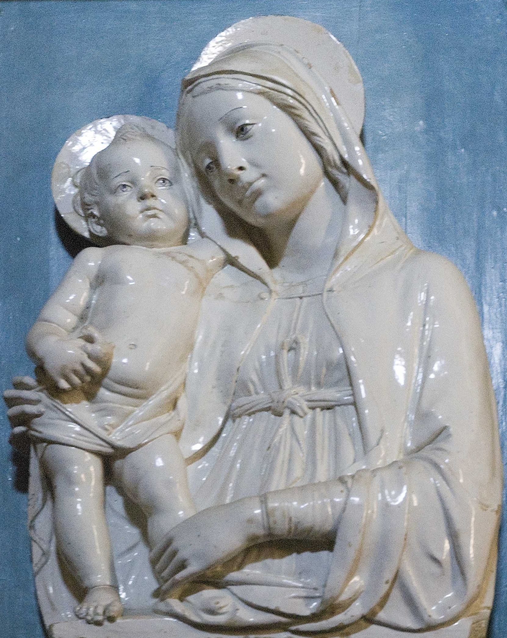 Madonna con Bambino, Andrea della Robbia, pieve di Santa Maria Assunta , Stia